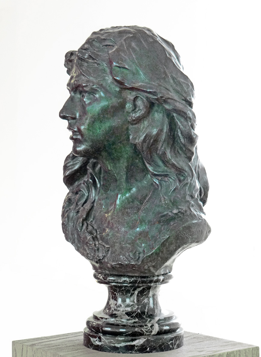 Rose Beuret en mignon Oeuvre d'Auguste Rodin (1840-1917) 1870 Bronze Musée des beaux-arts d'Angers Rose Beuret fut la compagne de toute la vie de Rodin, qui ne l’épousa que quelques semaines avant sa mort, en 1917. Simple blanchisseuse originaire de Champagne, elle rencontra Rodin lorsque celui-ci travaillait au fronton du théâtre des Gobelins, en 1864, à Paris. Elle donna naissance à un fils, Auguste, lui servit de modèle (Mignon, Bellone, L’Alsacienne), et à l’occasion, de garçon d’atelier, prenant soin des terres et des plâtres durant les absences du sculpteur....